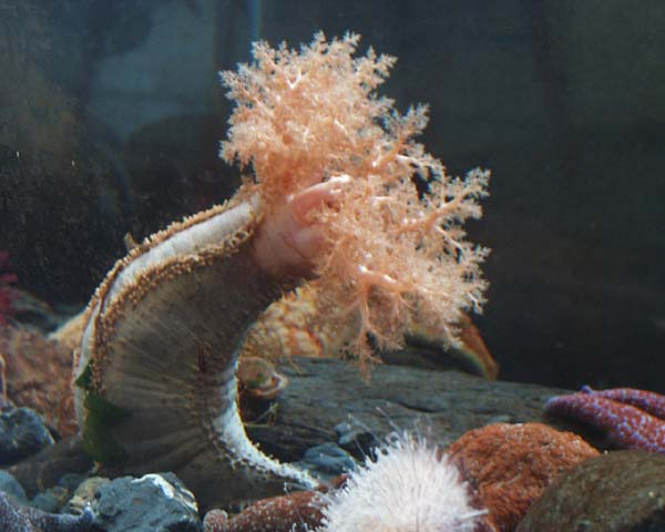 Orange Sea Cucumber, Cucumaria miniata